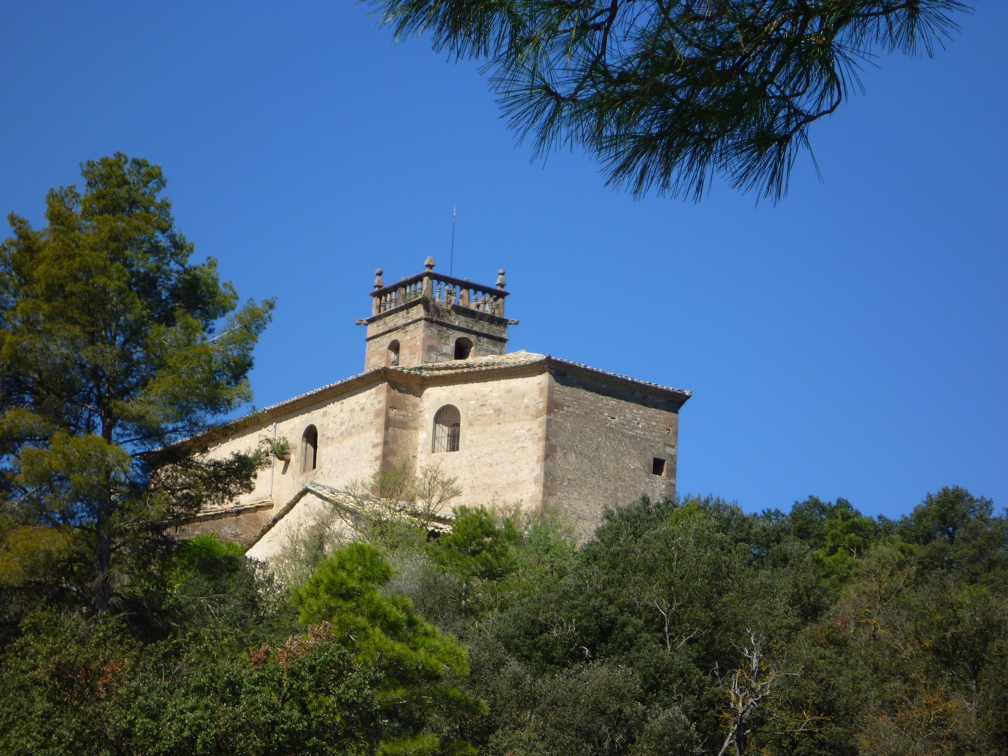 Església de Sant Pere de Matamargó (Pinós)